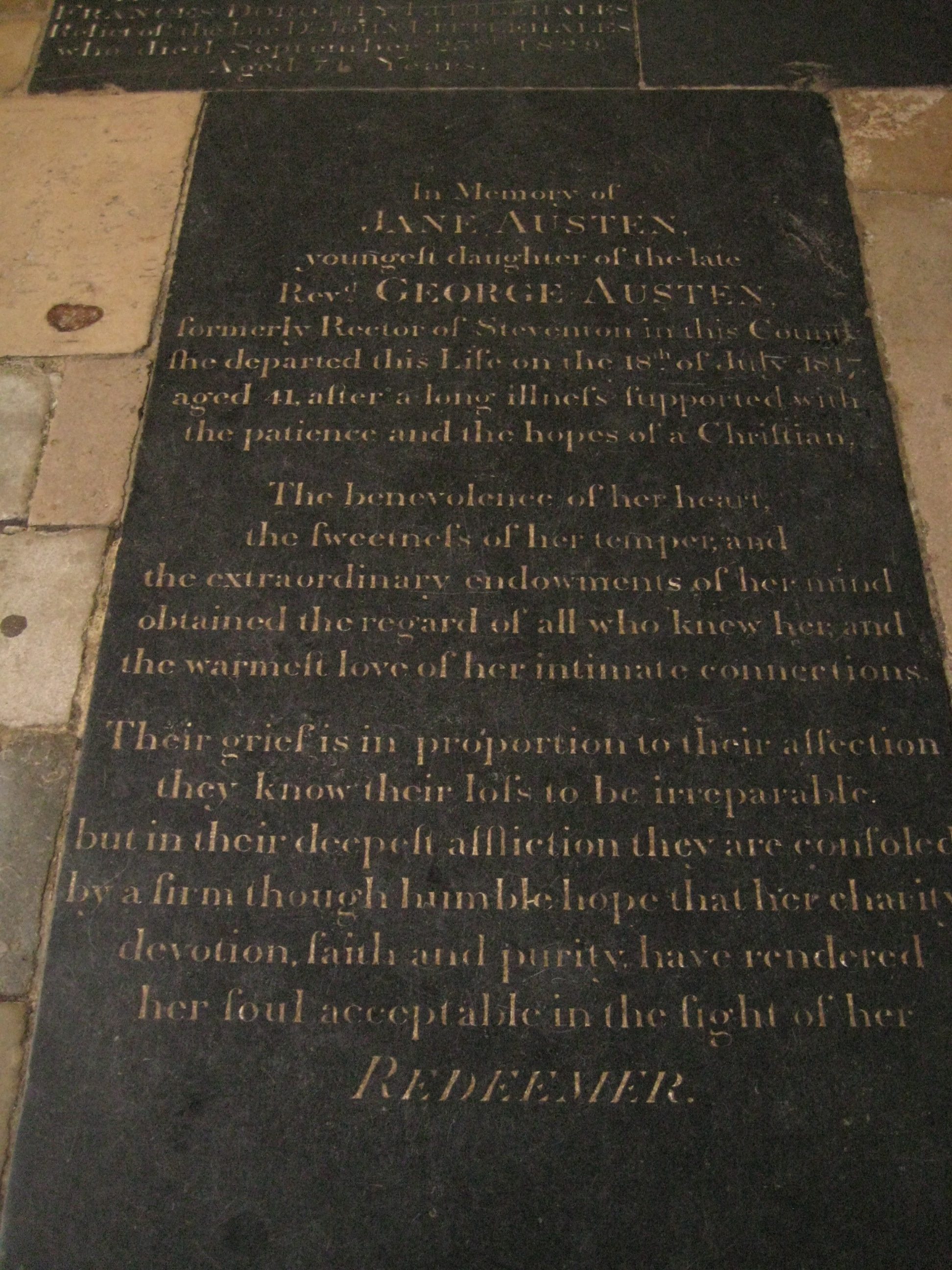 Grabplatte von Jane Austen in der Kathedrale von Winchester